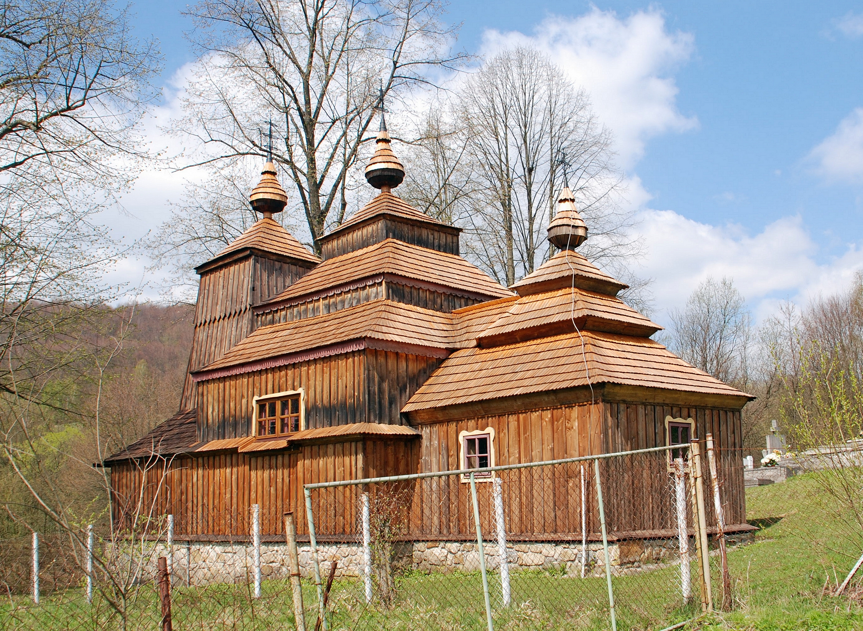 wieś Prikra